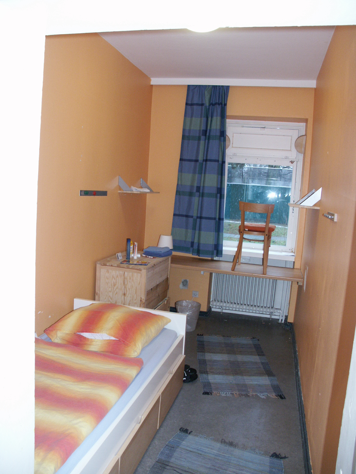 Faktische "Zelle" in der nicht mehr existierenden "Geschlossenen Unterbringung Feuerbergstraße" für Jugendliche in Hamburg (2006)